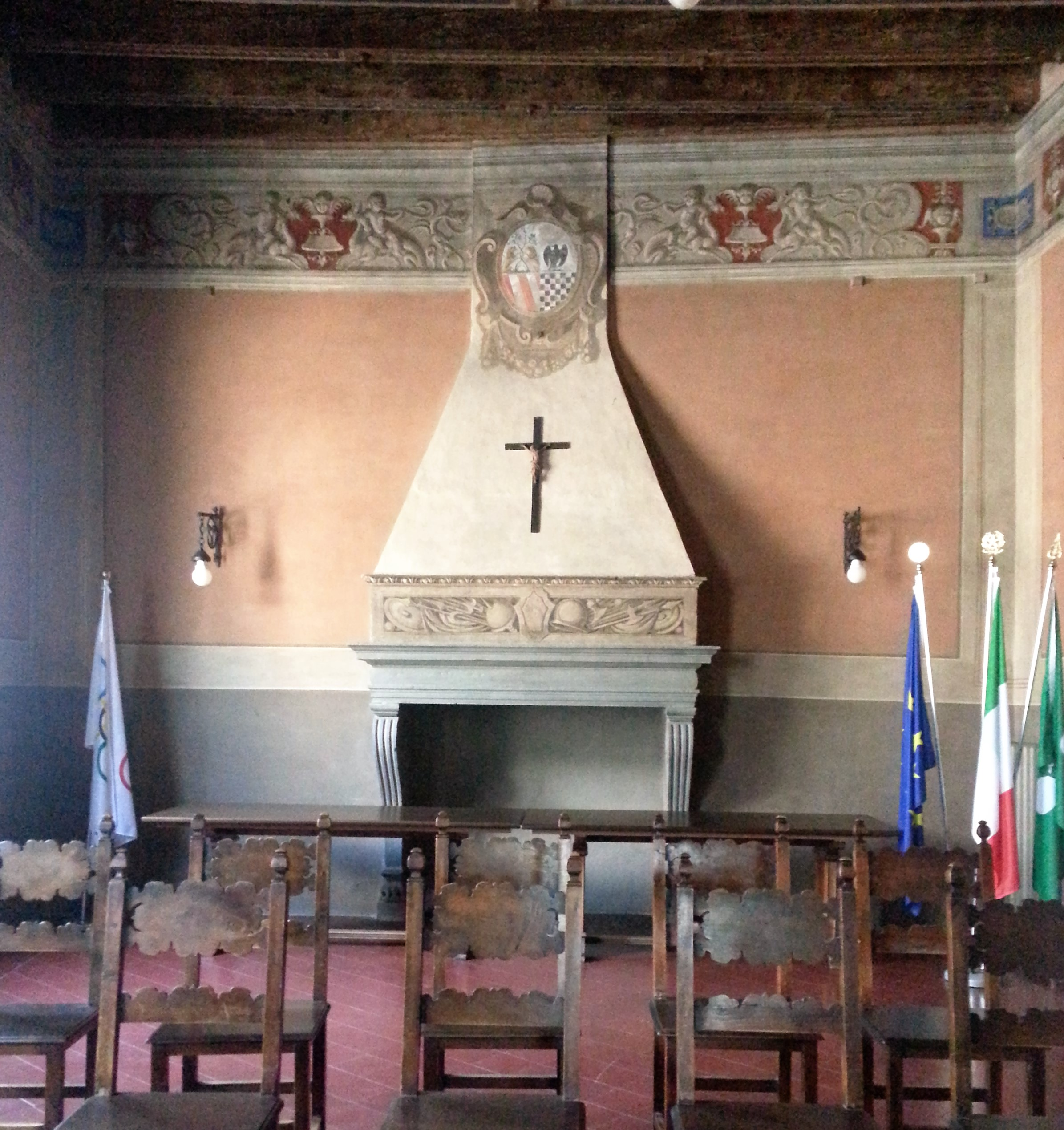 Camino con stemma della famiglia del palazzo Milesi nella sala Consiliare di Gromo